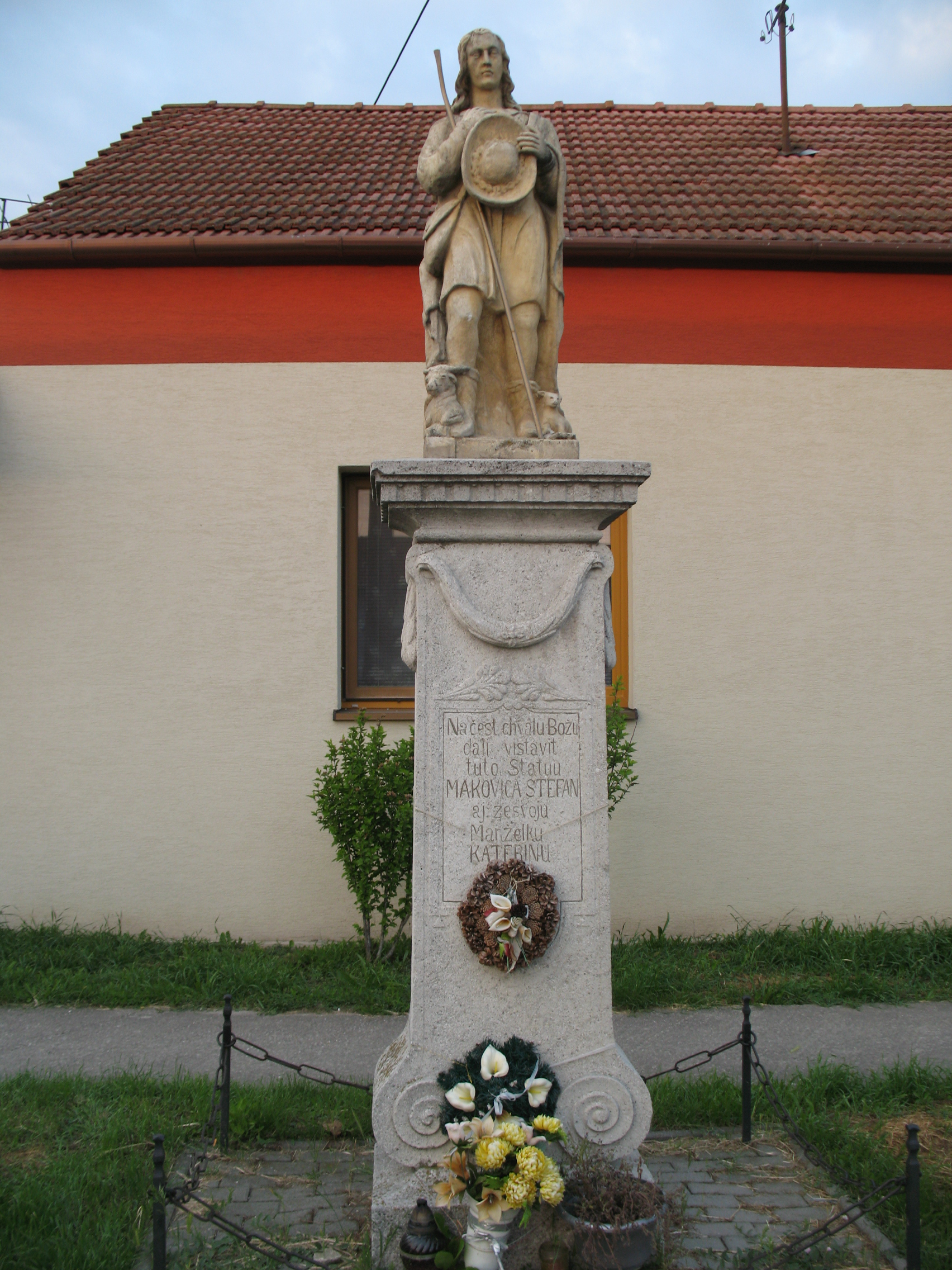 Bucsány